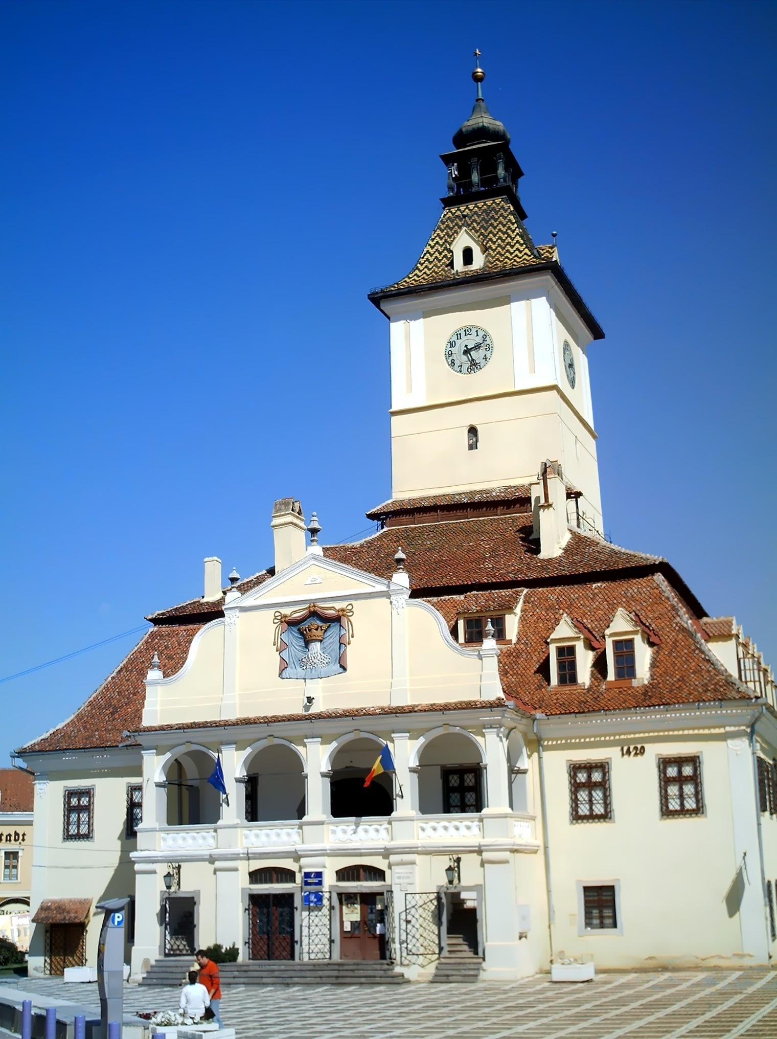 Braşov.